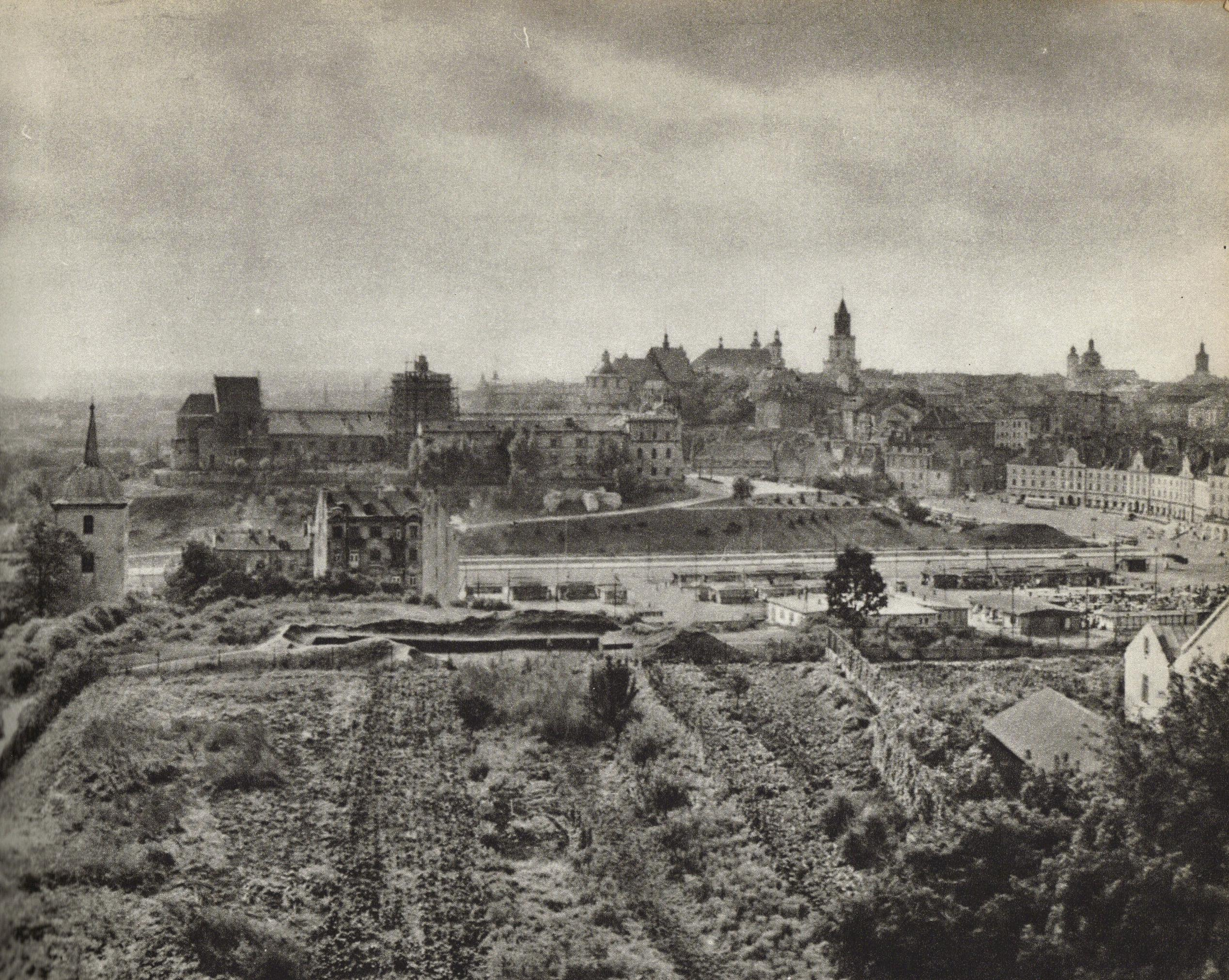 Panorama Starego Miasta z Czwartku